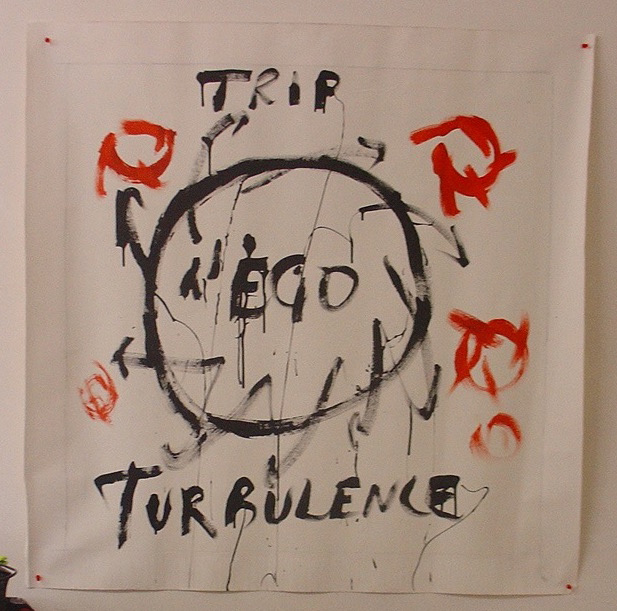 peinture